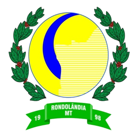 Brasão do município de Rondolândia MT